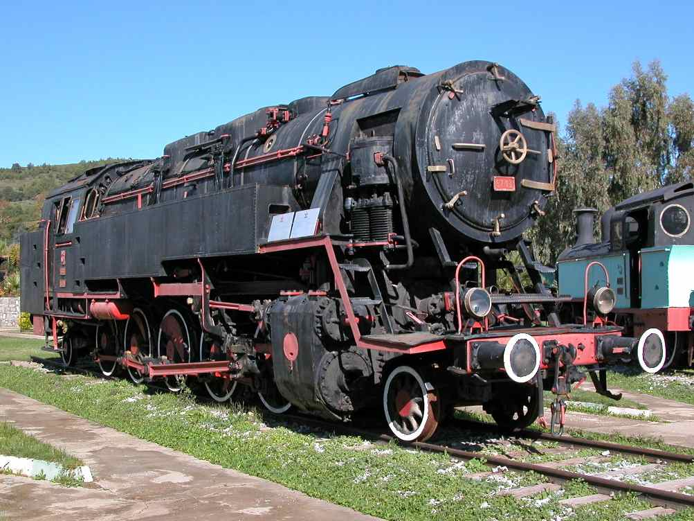 57 01 im Türkischen Eisenbahnmuseum Çamlık